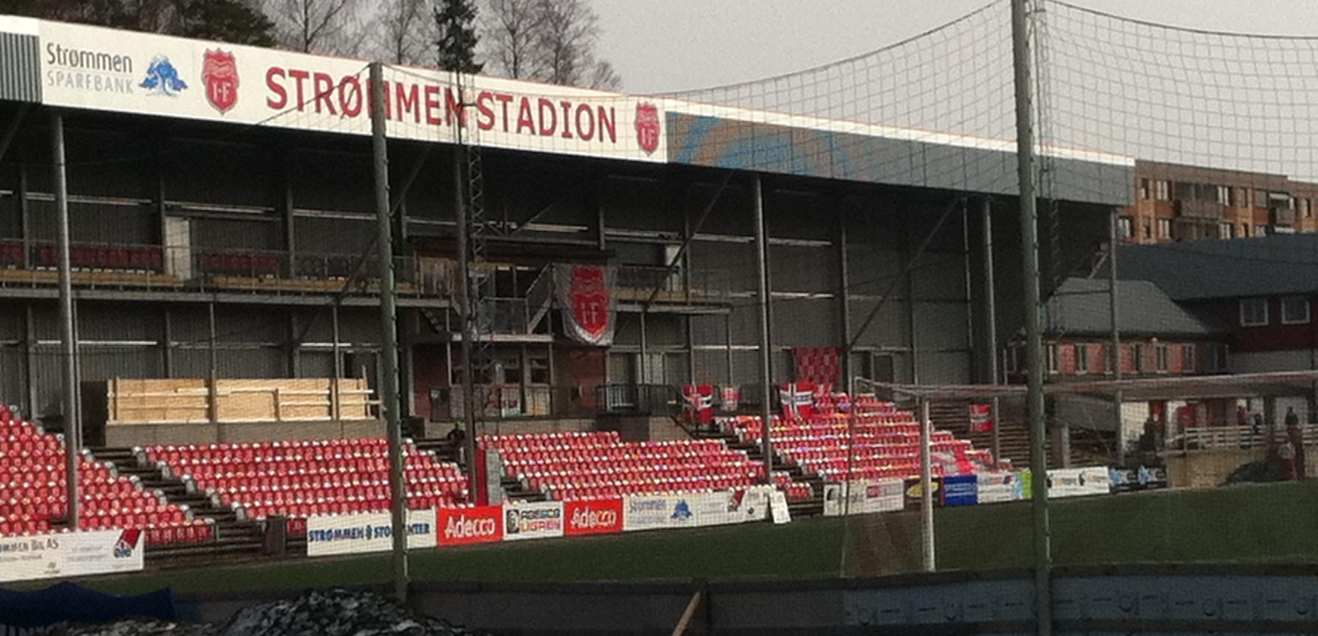 Taken in Løvnstad, Akershus Fylke